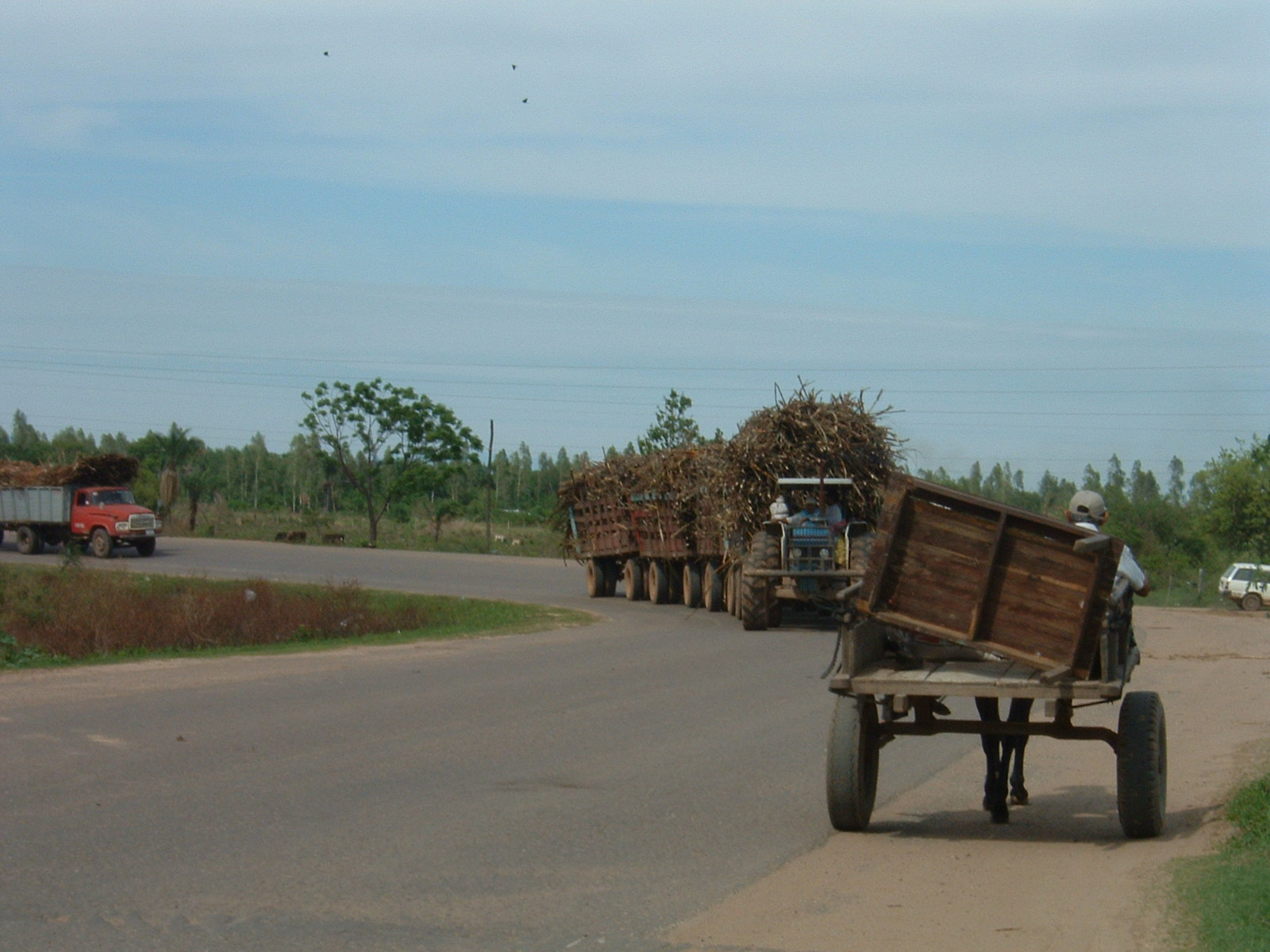 Camion che trasporta canna da zucchero È una foto scattata da me --NicFer 14:17, Apr 14, 2005 (CEST) Categoria:Immagini esclusivamente in GNU FDL